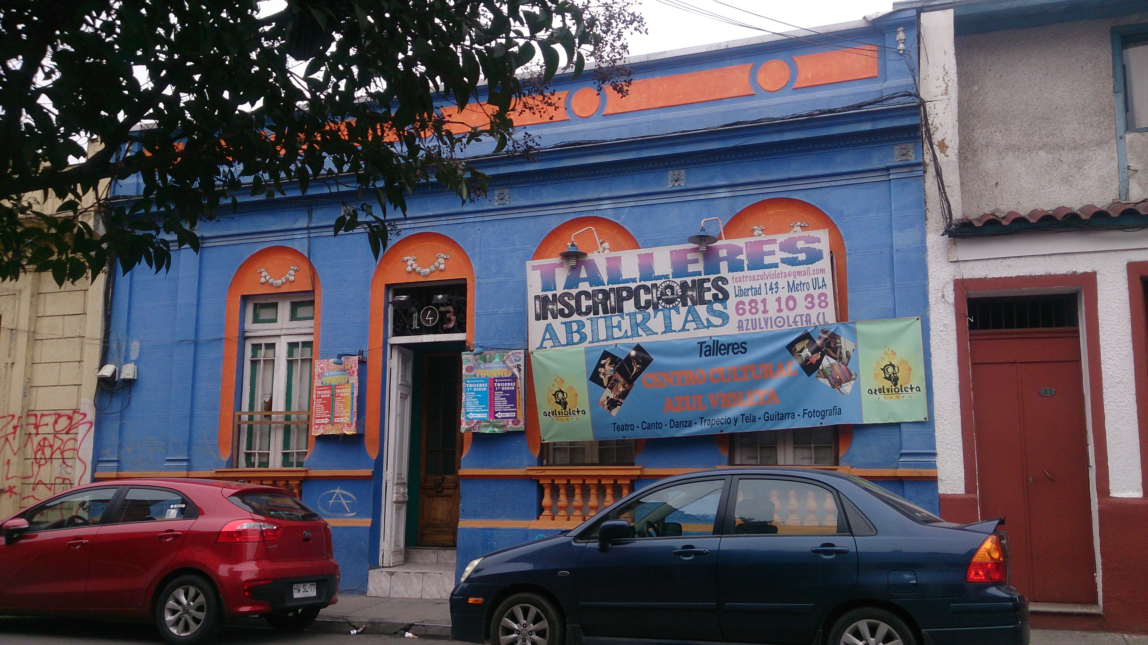 Fachada